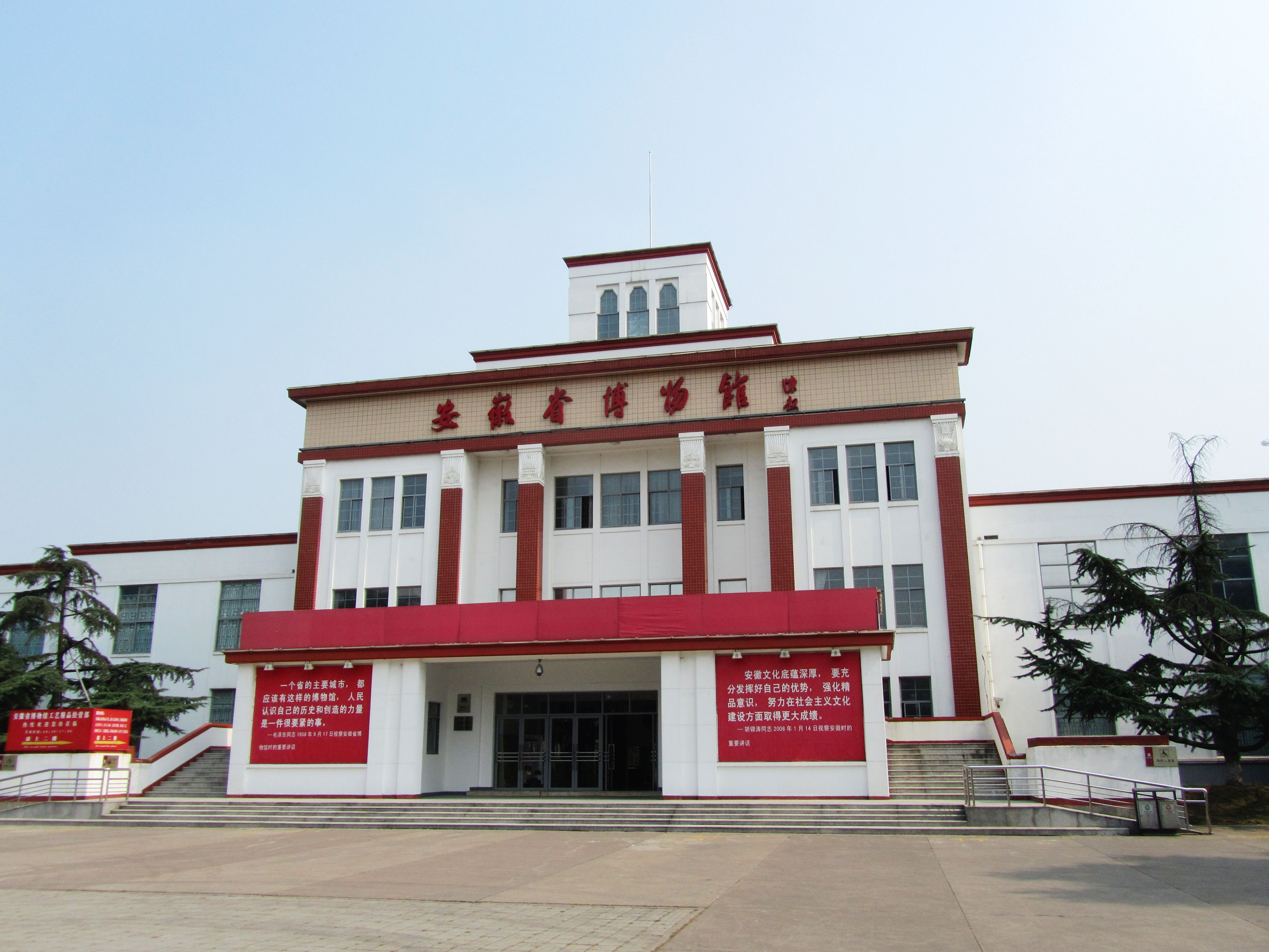 安徽省博物馆安庆路旧馆主楼。